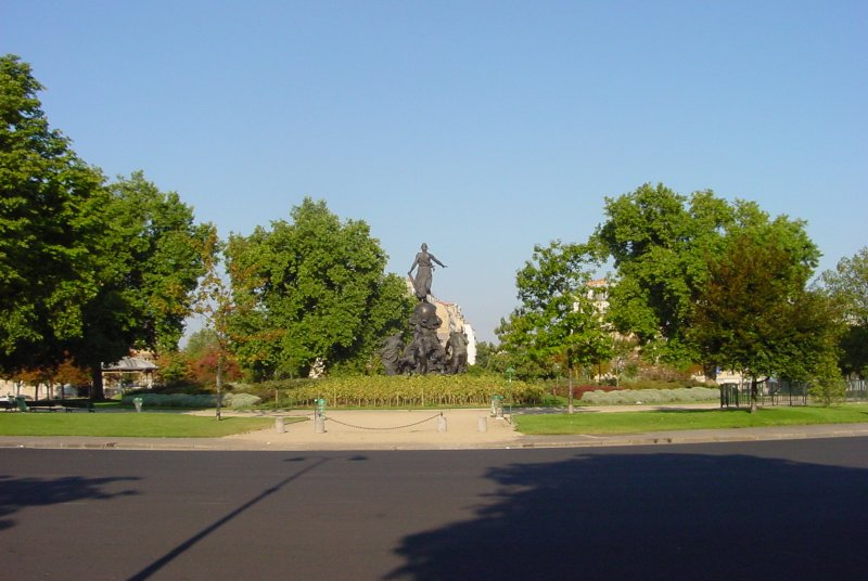 Place de la Nation